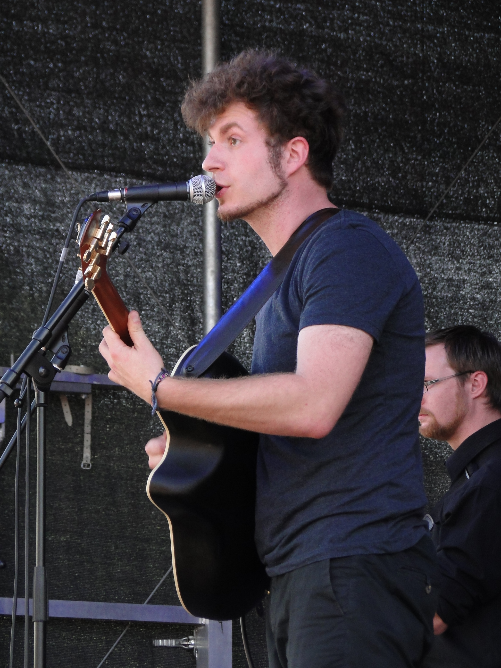 Rany Dabbagh, ehemaliger Sänger der Band [pi !], 2012